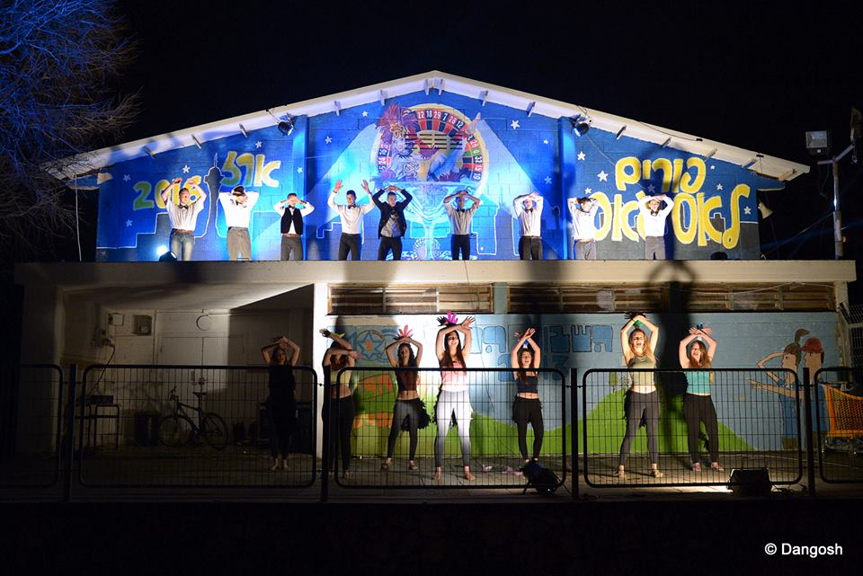 חשיפת נושא פורים, האירוע הגדול של השנה